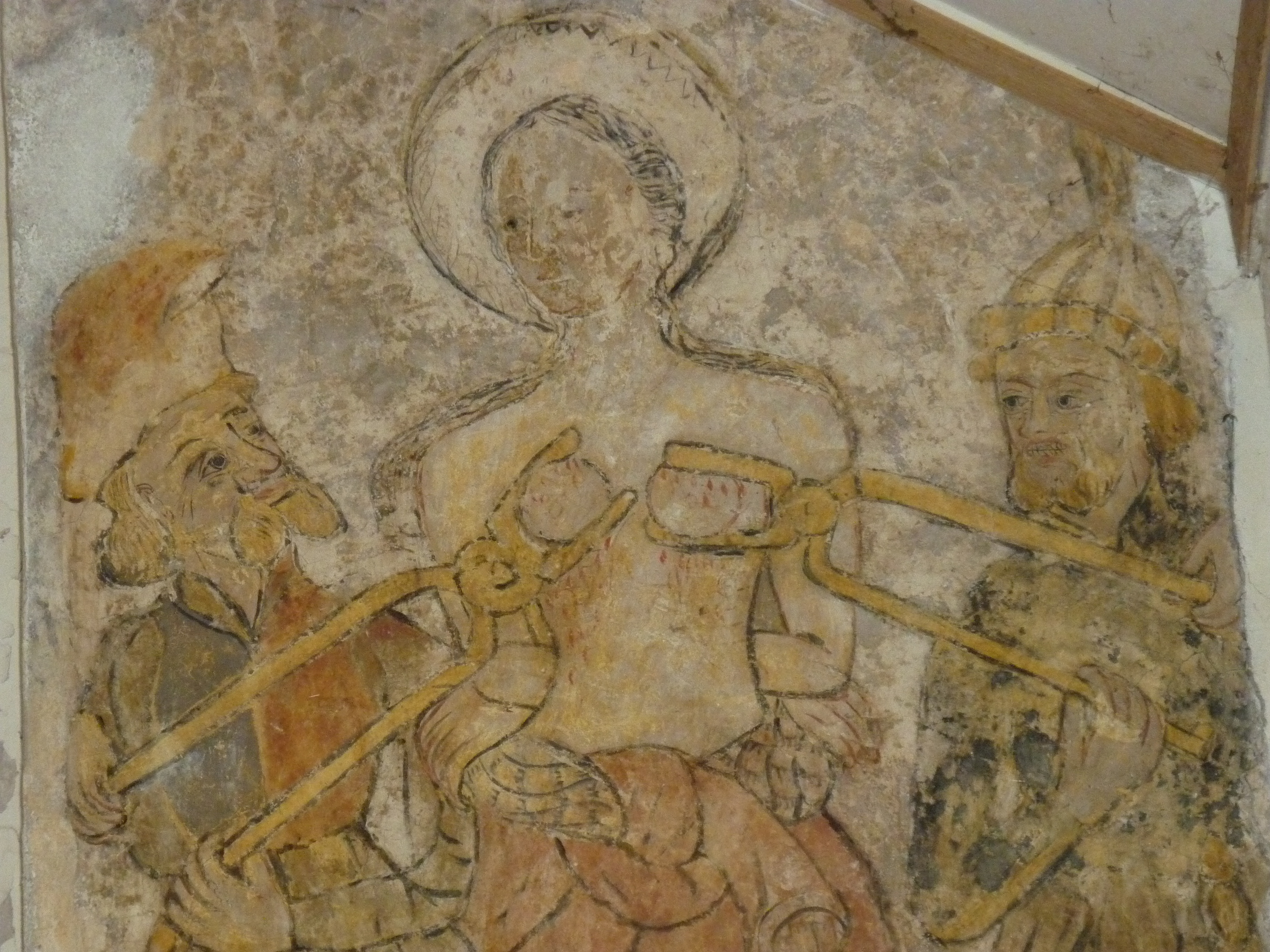 Fresque de l'église de Ris